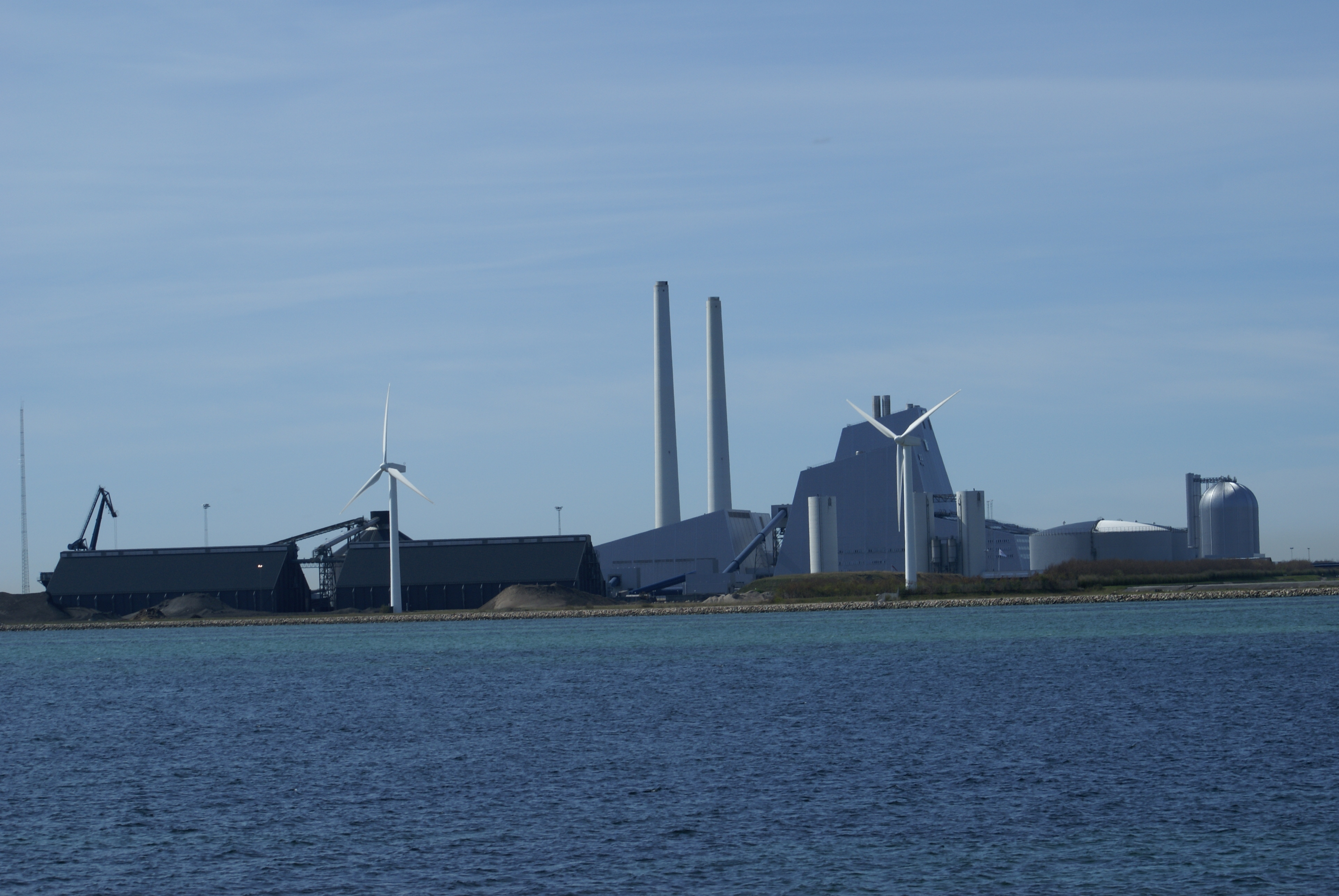 Avedøreværket, set fra Vestamager